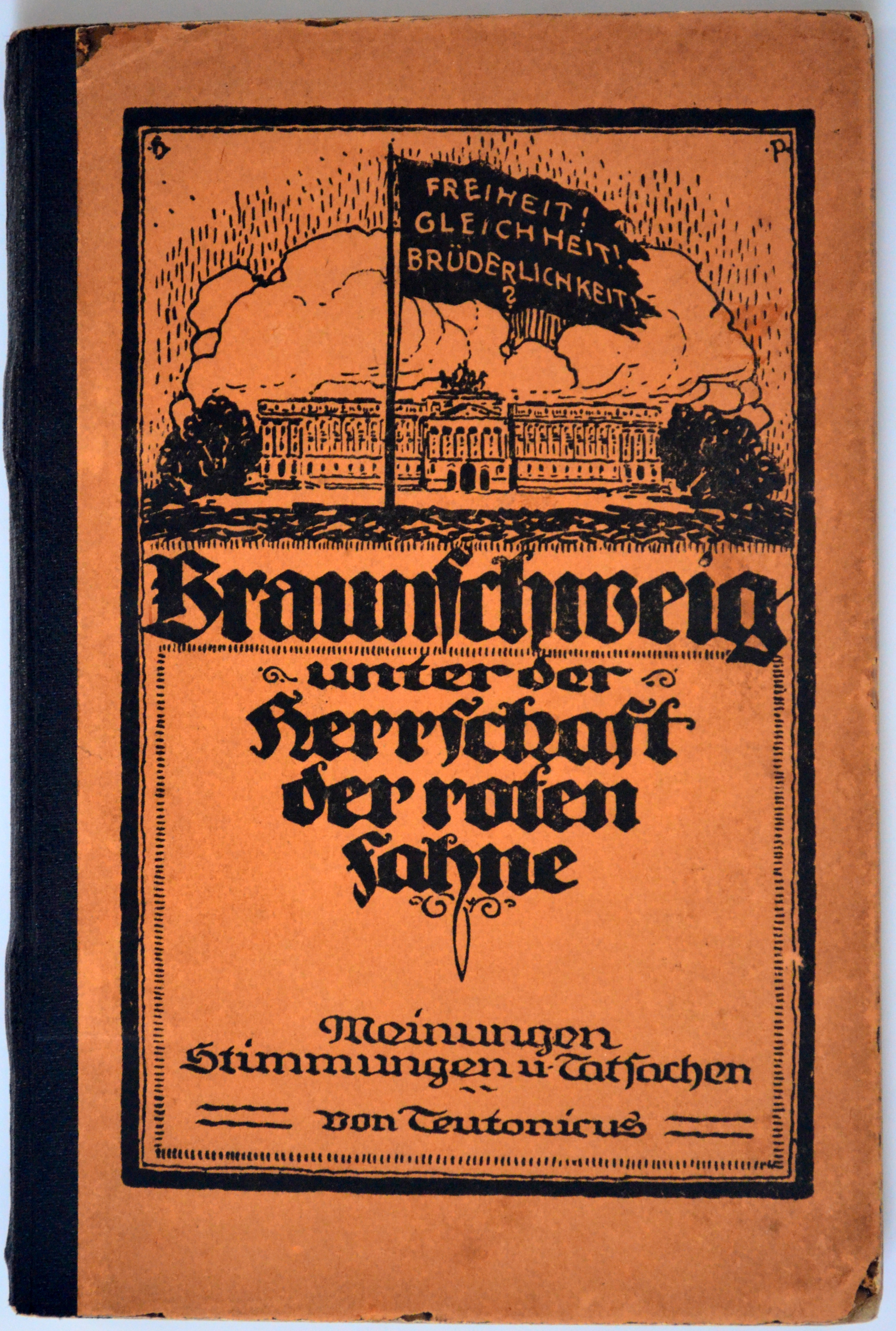 Braunschweig, Novemberrevolution in Braunschweig: Teutonicus (= Pseudonym von Hermann Schroff): Braunschweig unter der Herrschaft der roten Fahne. Meinungen, Stimmungen und Tatsachen. Ohne Ort, ohne Verlag, ohne Jahresabgabe (ca. 1920)